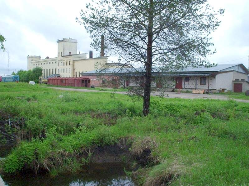 Харовский шпалопропиточный завод. Вид с ограды в северном направлении. Впереди — главные корпуса завода, на дальнем плане виден разгромленный вагон метрополитена типа Б. Харовск, Вологодская область.